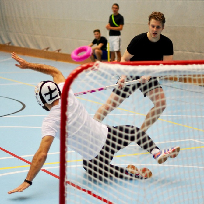 Donut Hockey-Torschussszene mit Torhüter